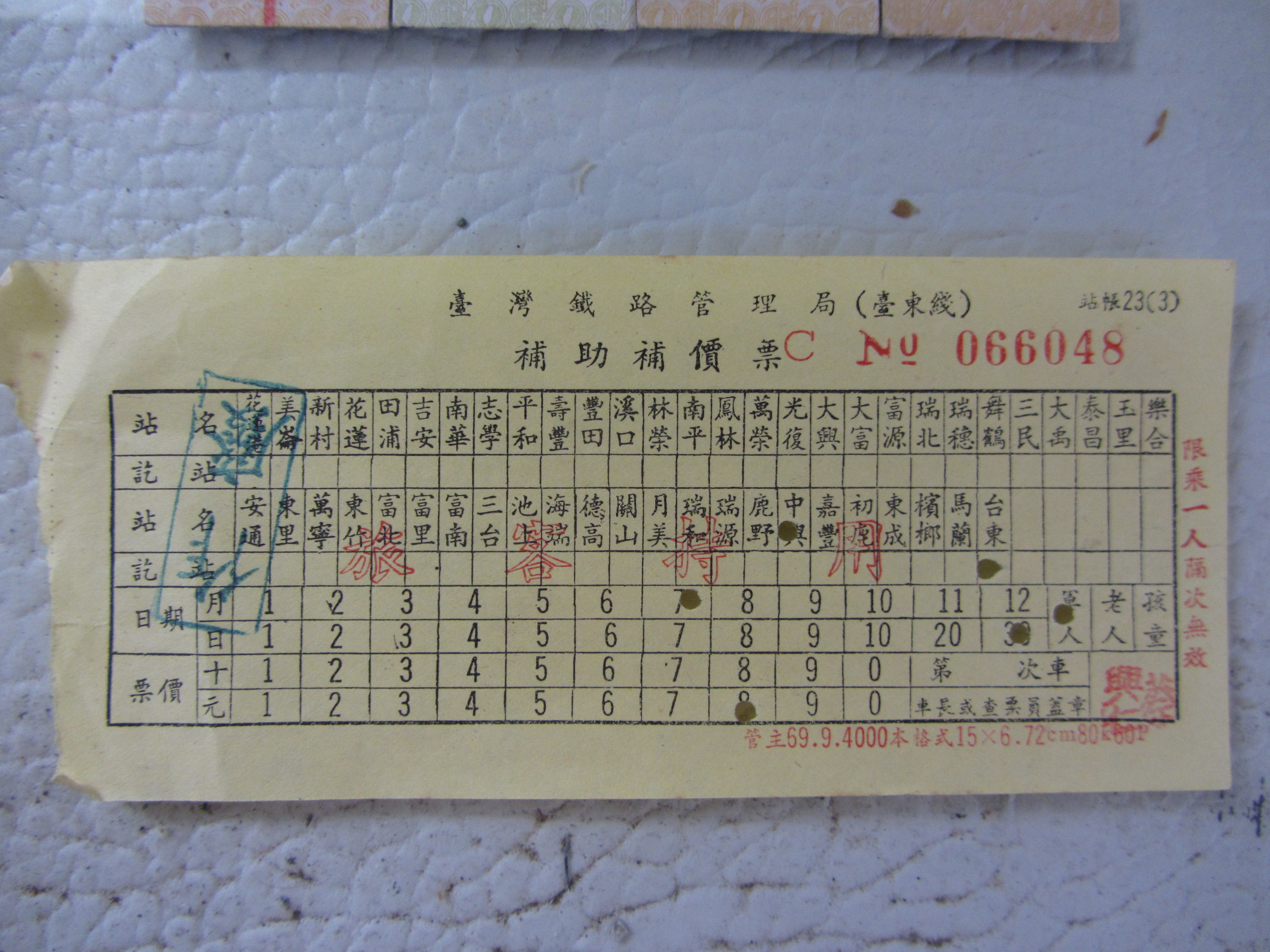 臺灣鐵路管理局臺東線拓寬前補助補價票